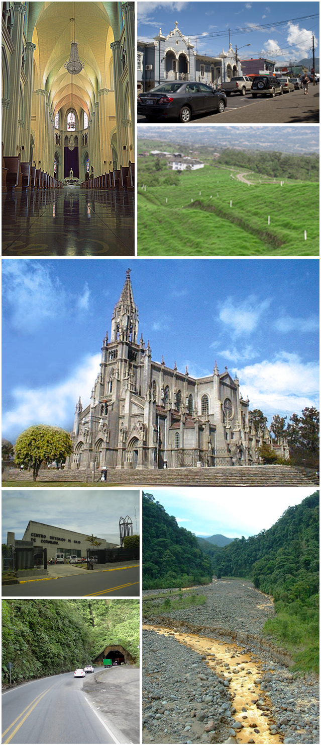 Collage con imágenes de los puntos más representativos del cantón de Vázquez de Coronado, Costa Rica.